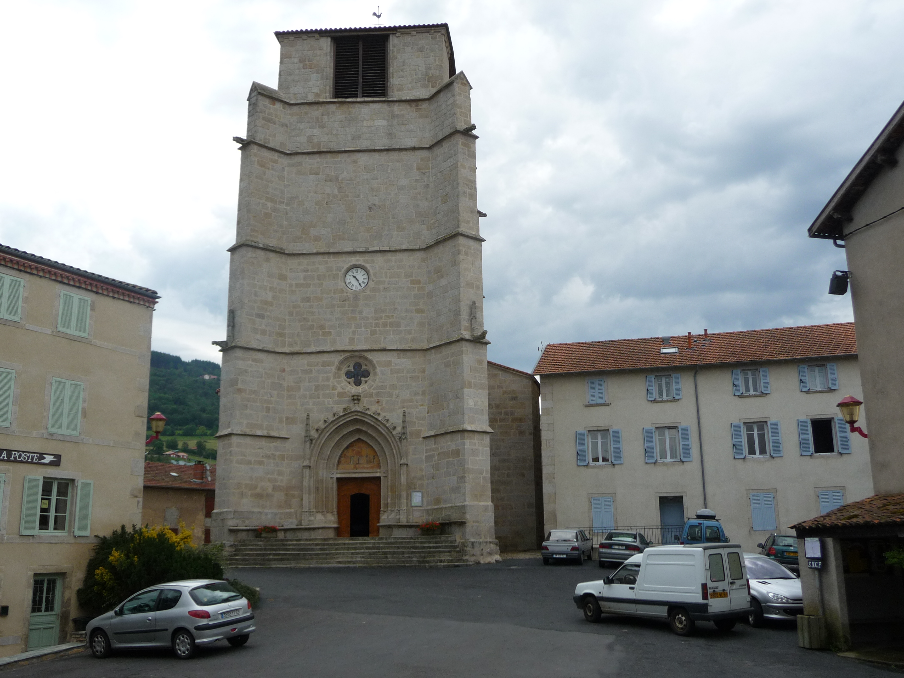 Église de Job.